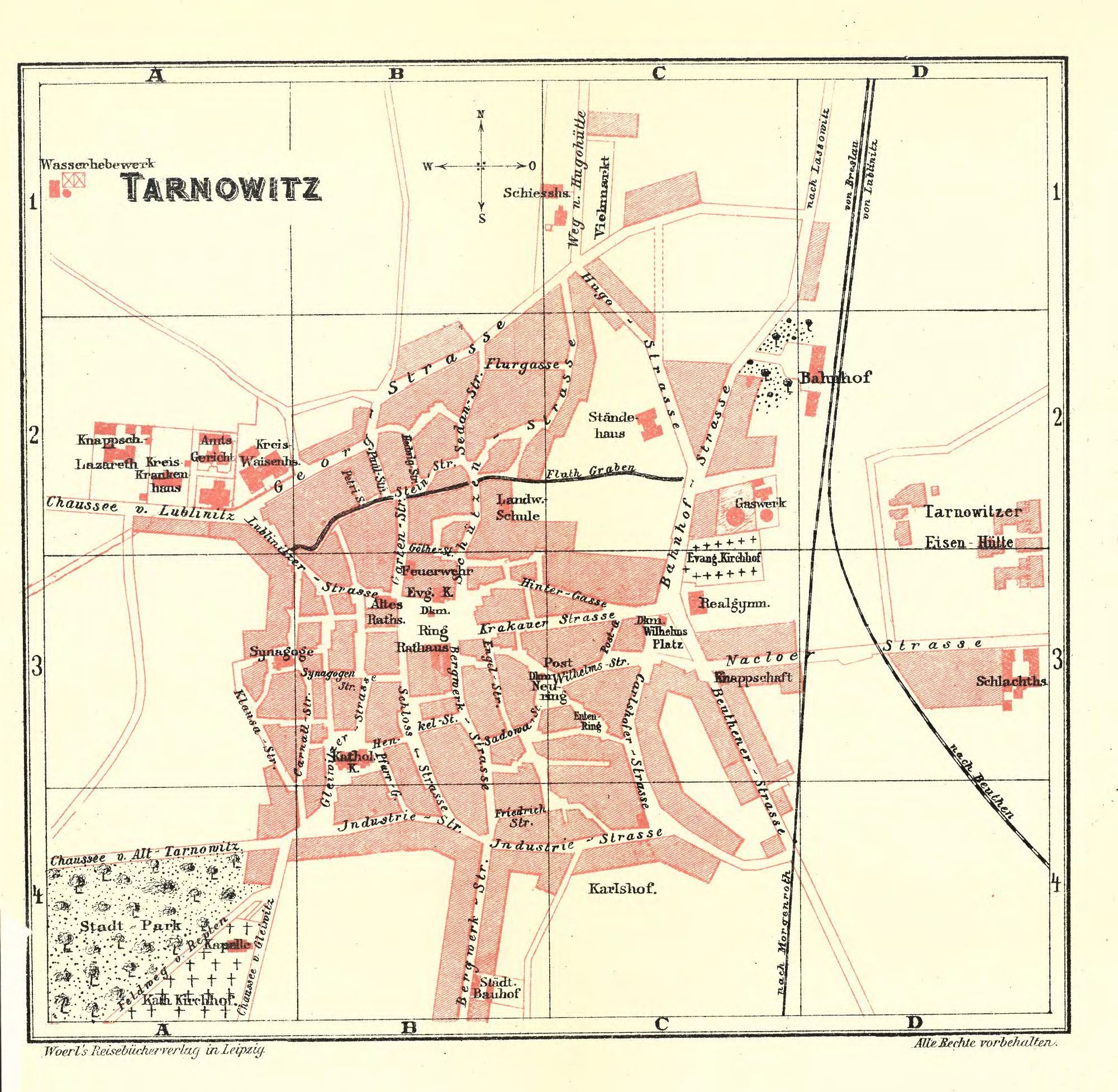 Mapa śródmieścia miasta Tarnowskie Góry pochodząca z Ilustrowanego Przewodnika po Górnośląskim Obszarze Przemysłowym wydanego w Lipsku w 1904